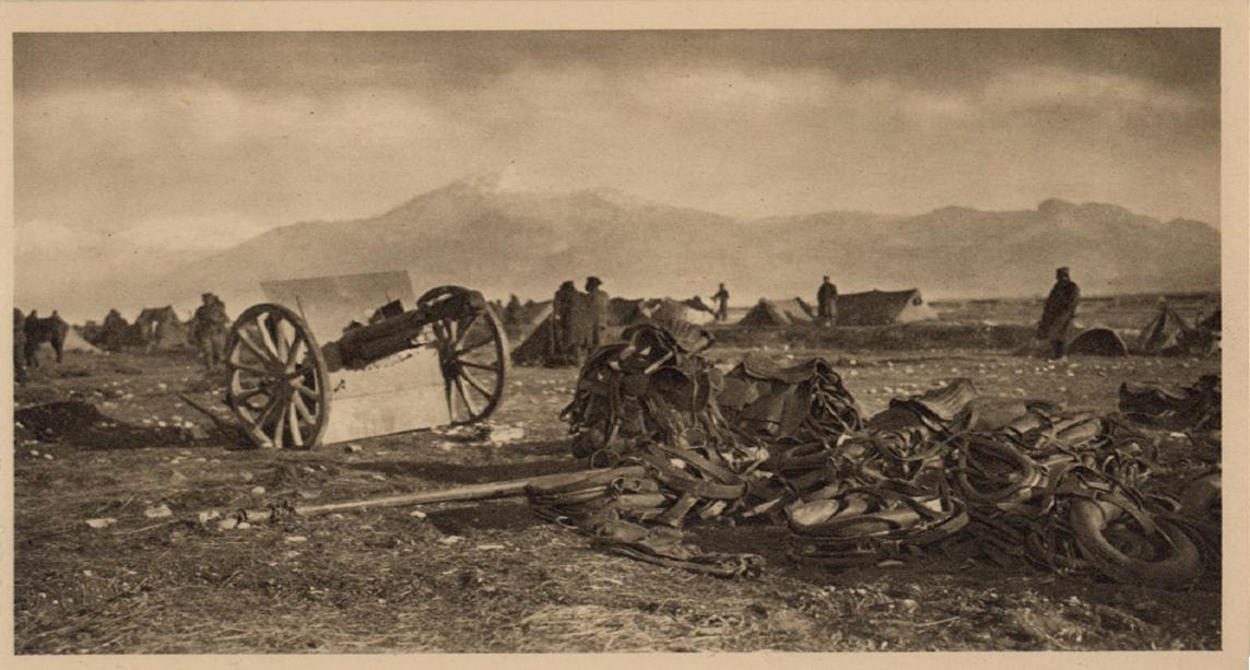 Одбацивање свега што је неприкладно за транспорт, фотографија Самсона Чернова објављена у албуму „Петогодишњи рат – Срби 1912-1916“ у Лондону 1916. године.